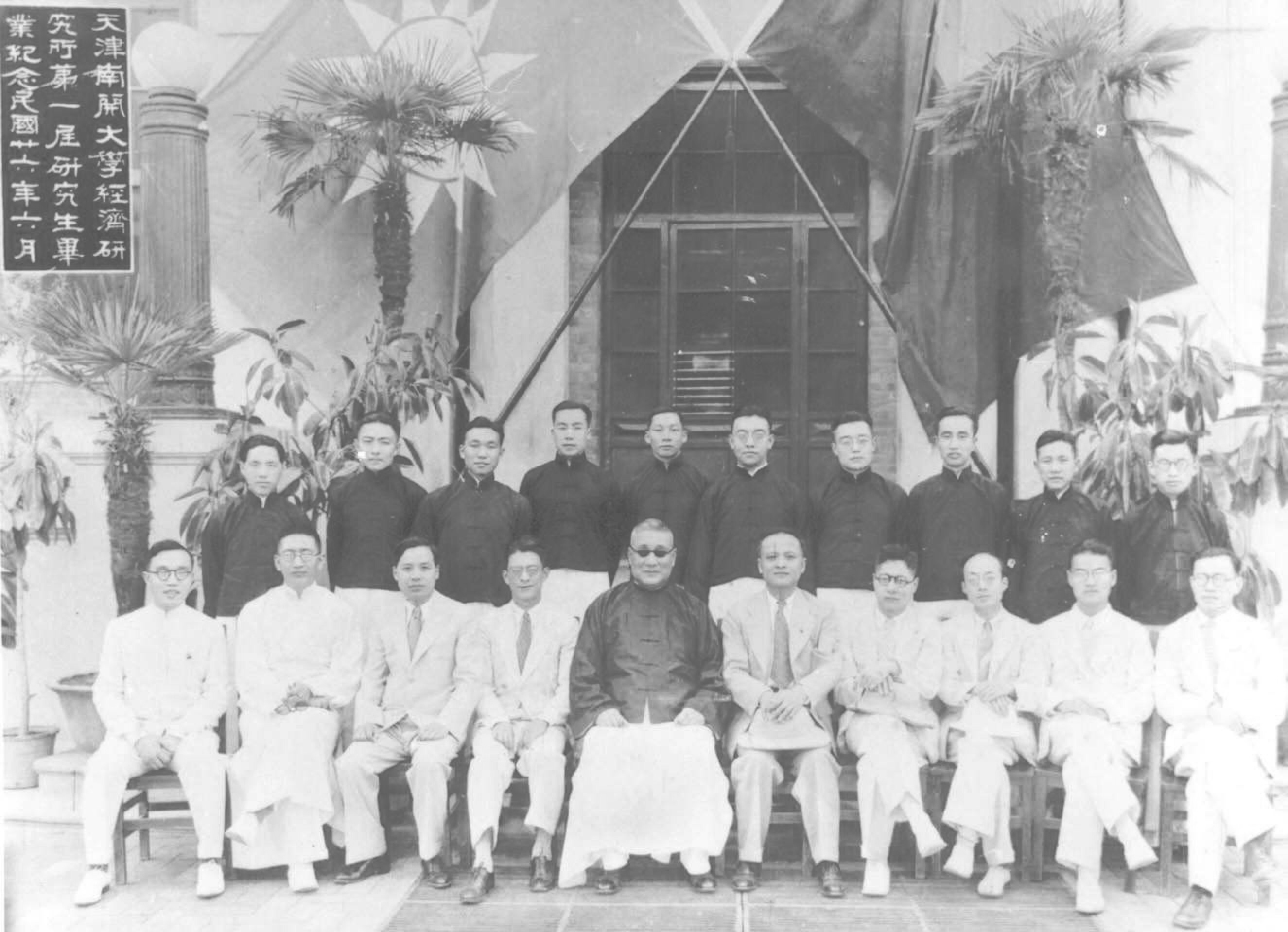 中文（中国大陆）: 南开大学经济研究所第一届研究生毕业纪念